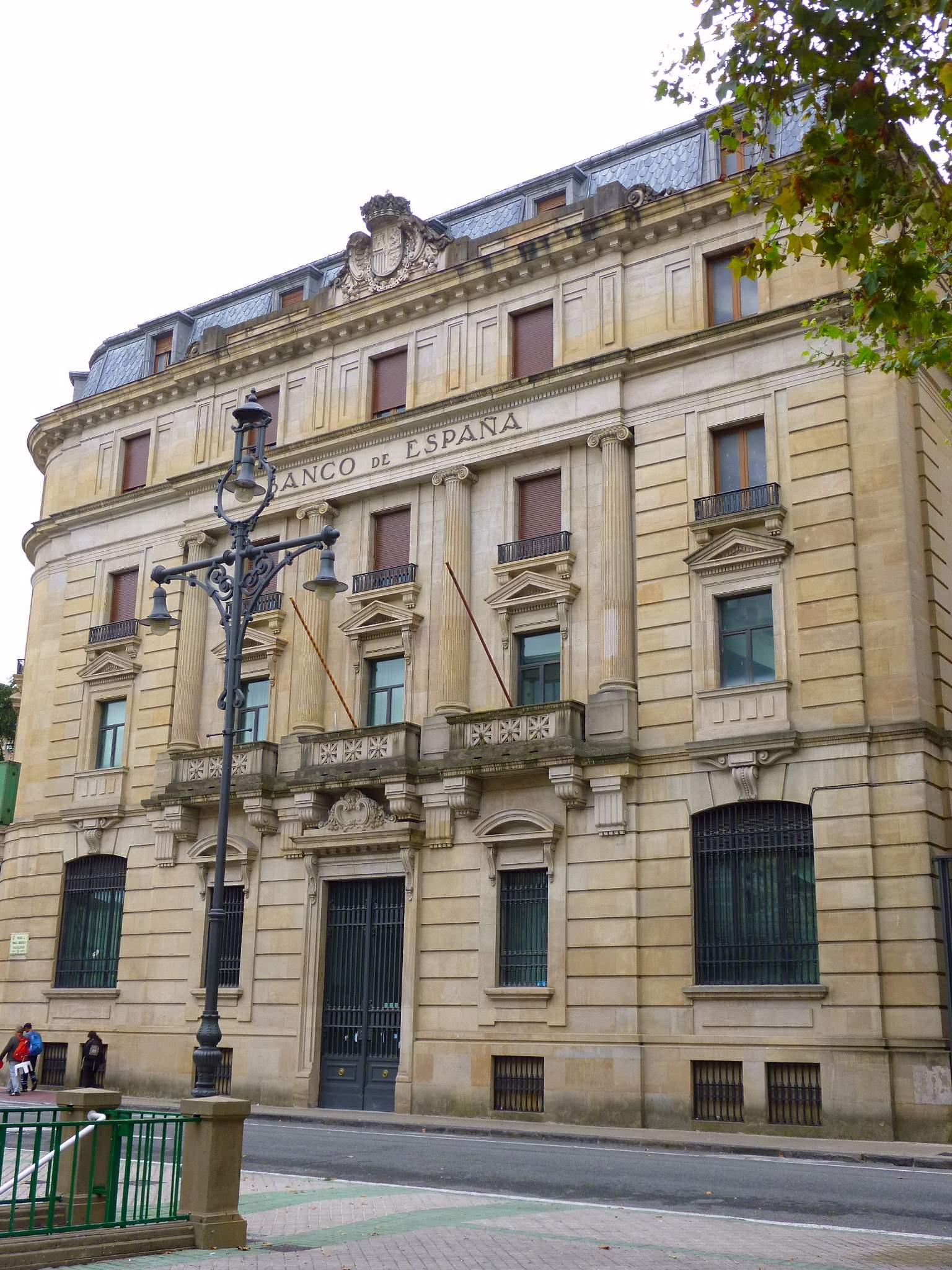 Banco de España (Pamplona)